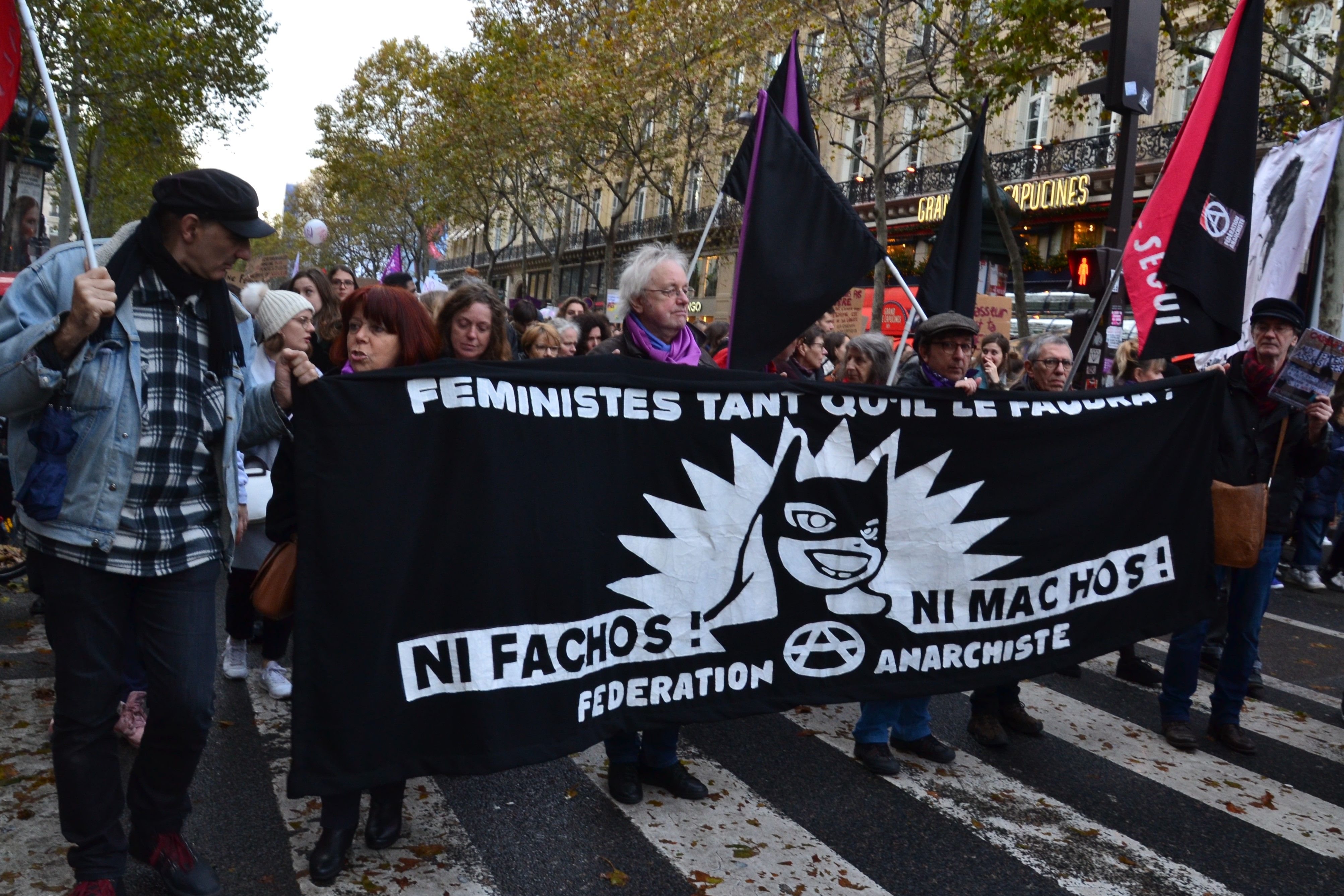 Une énorme mobilisation. Entre 50.000 et 100.000 personnes à Paris pour ce 23 novembre 2019 March against sexist violences and sexual violence. A huge mobilization. Between 50,000 and 100,000 people in Paris - 23 November 2019